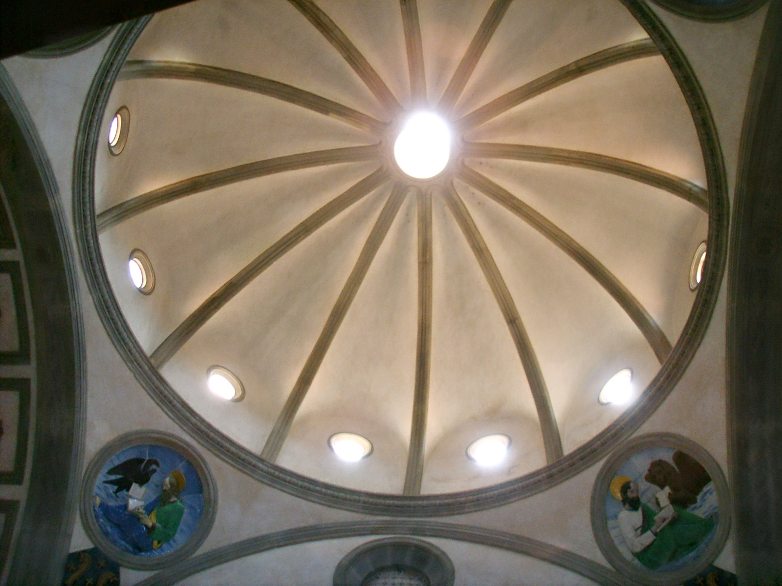 Santa Croce church, cappella dei Pazzi dome with Luca della Robbia works, inside view, in Florence, Italy